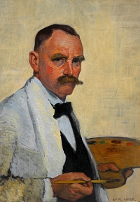 Selbstbildnis mit Pinsel und Palette